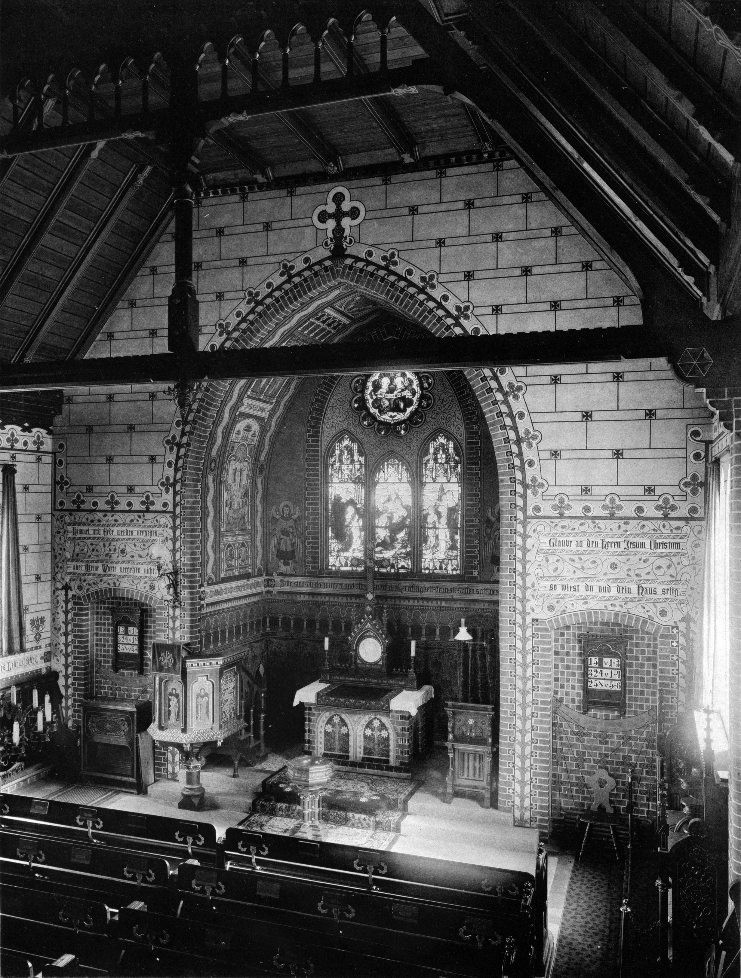 Innenraum der Pfingstkapelle in Potsdam, Große Weinmeisterstraße; erbaut 1894 nach Plänen des Architekten Ludwig von Tiedemann